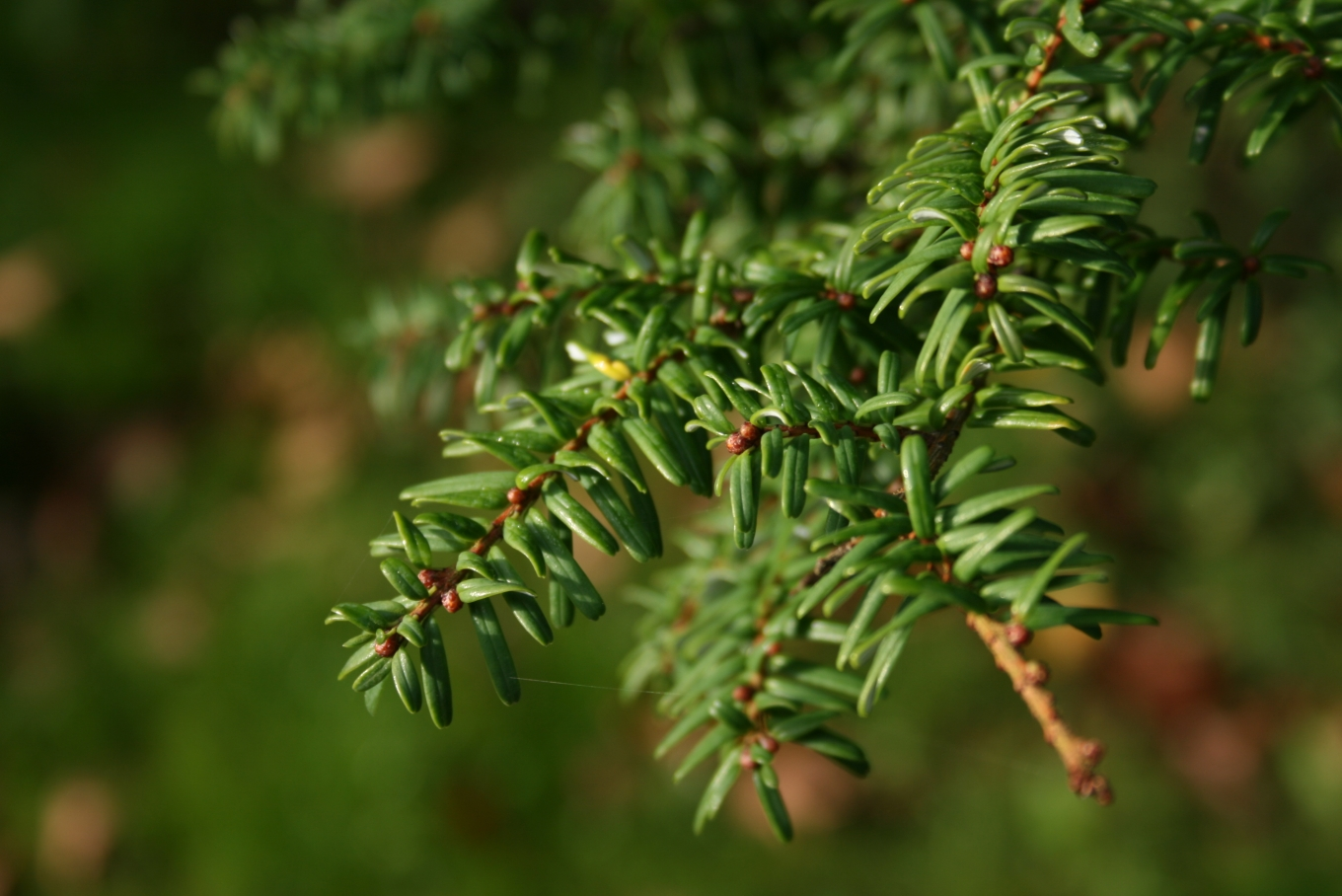 Tsuga sieboldii: Foliage.